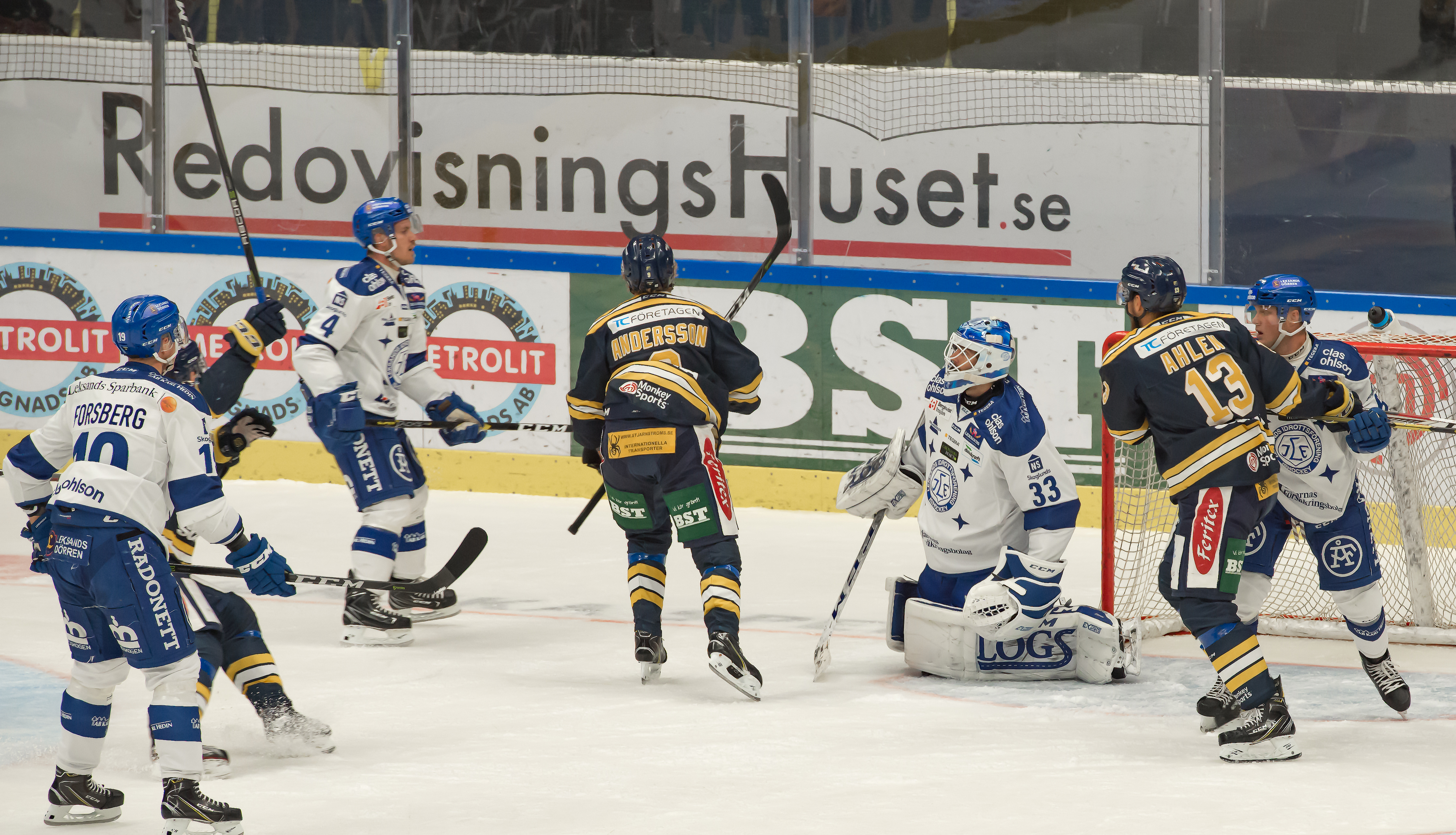 Södertälje vs Leksand 2018-10-05